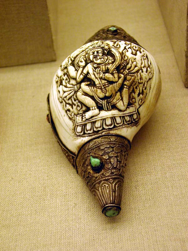 包银双身护法刻法螺 本文物为清代藏传佛教法器，为台湾收藏家王度收藏。法螺的纹饰为双身护法，即男女双身拥抱的护法，为藏传佛教常见的造型，反映的是藏传佛教的一种特别修行法。 2004年7月展出于北京大学赛克勒考古与艺术博物馆，User:Mountain2004年7月28日拍摄。拍摄者已授权依照GFDL协议发布该图像。